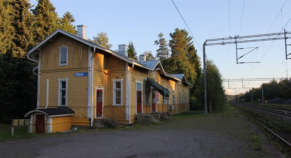 Otavan asema on Savon radan rautatieliikennepaikka Mikkelin Otavan taajamassa, Kesällä 2016 asemarakennus oli ainakin pääosin yksityiskäytössä.